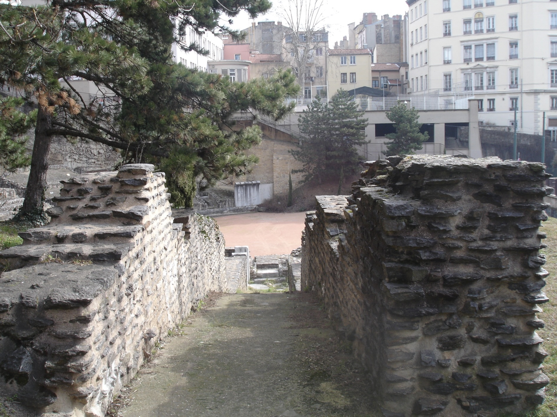 Lyon : amphithéâtre des 3 Gaules - murs et soubassement